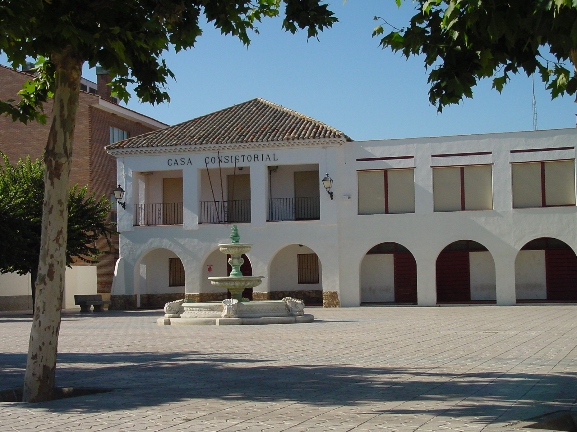 Ayuntamiento de Torrejón de la Calzada.